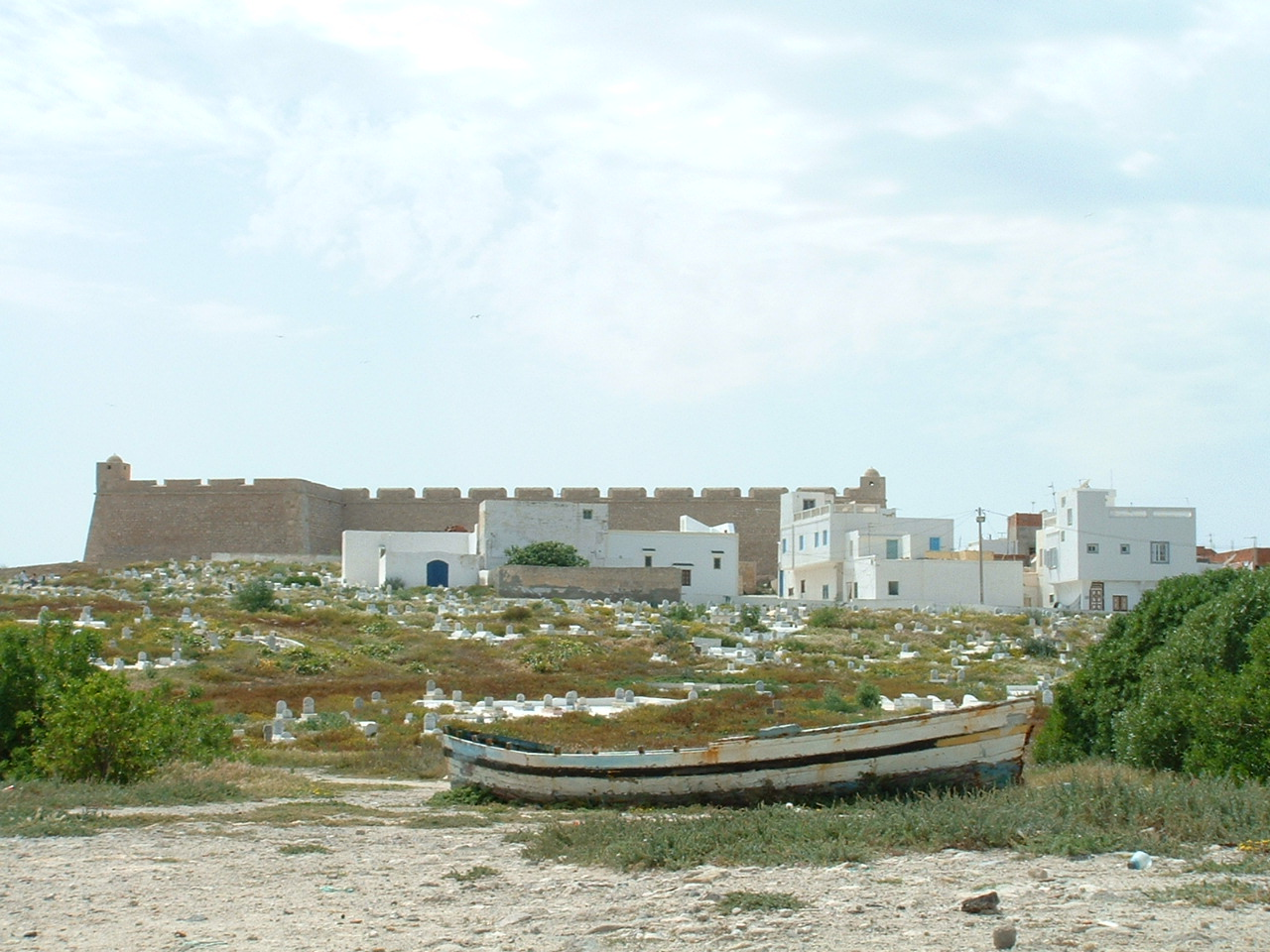 Vue du bordj de Mahdia à partir du cimetière marin